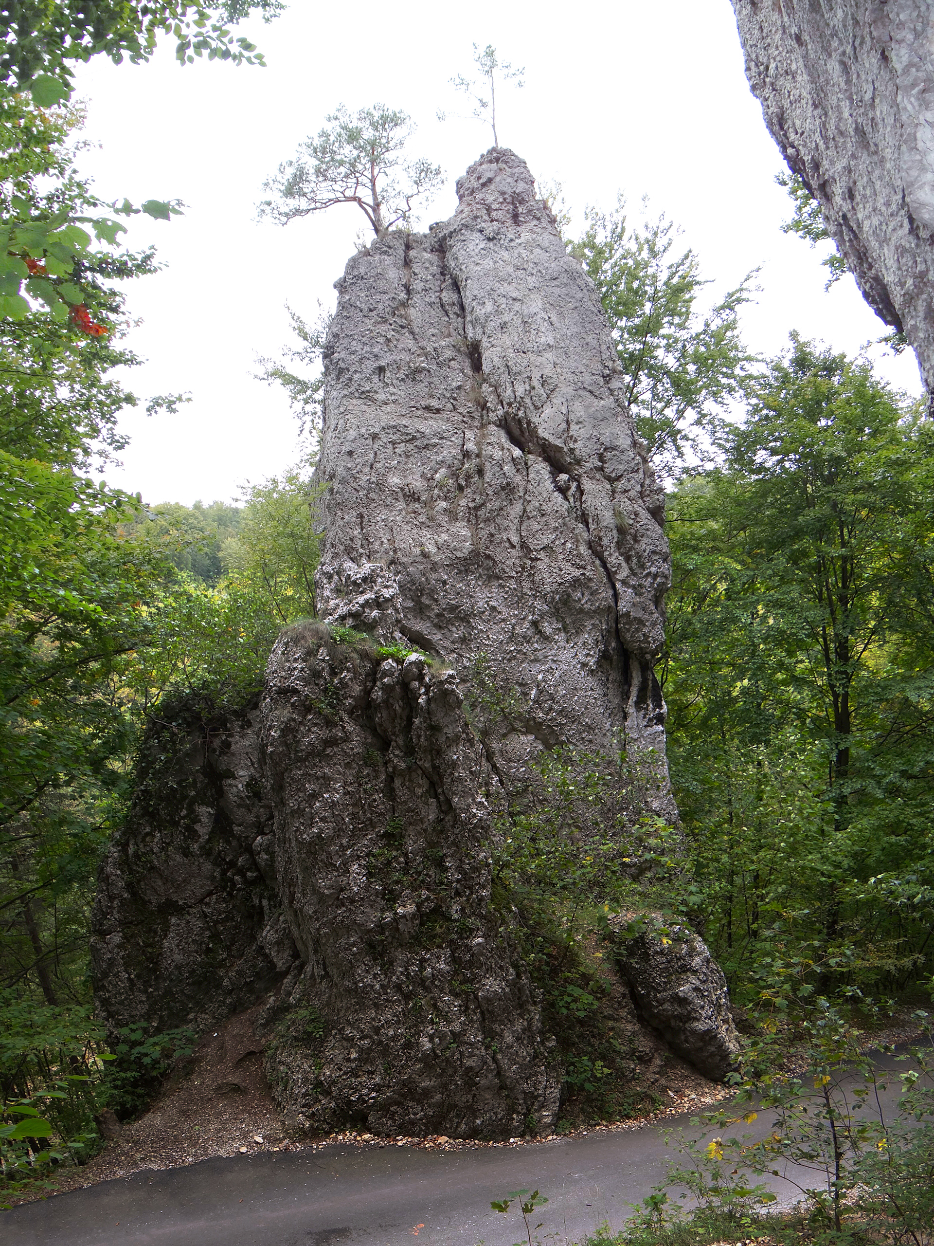 Dolna skała Czarcich Wrót